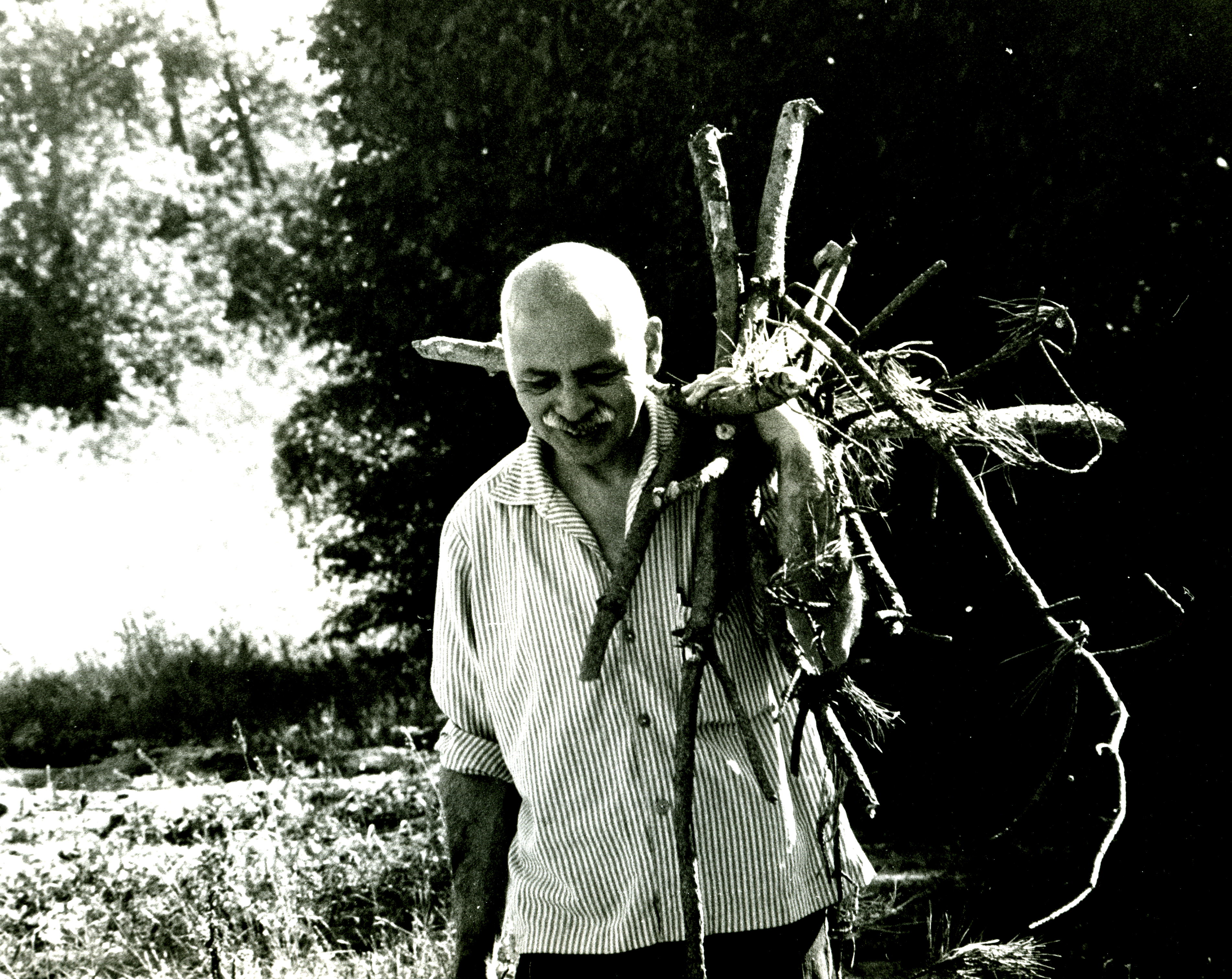 Le peintre chilien Eudaldo en 1969 (meilleure image?)